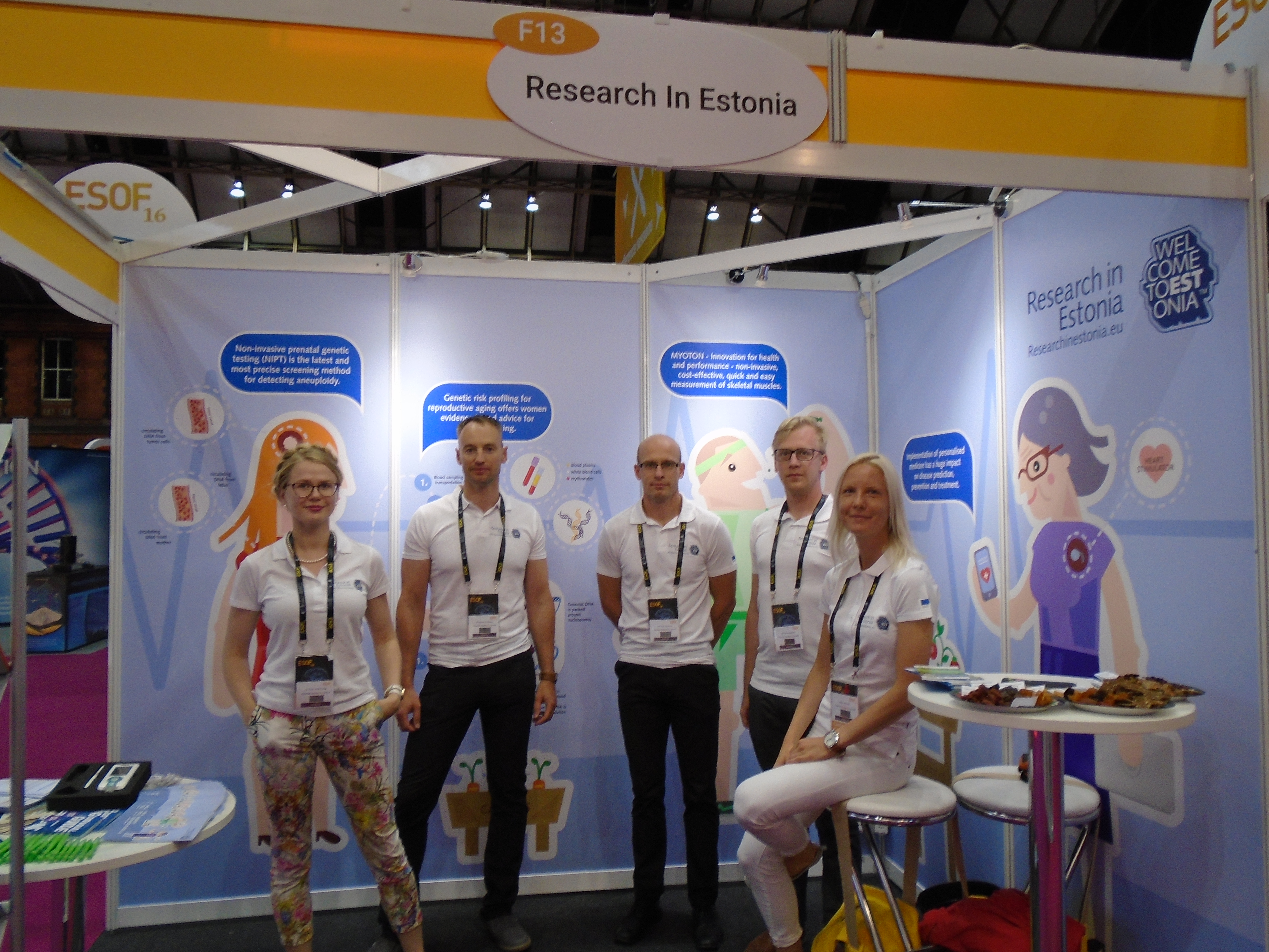 Eesti esindus 2016. aastal EuroScience Open Forumil, Manchesteris